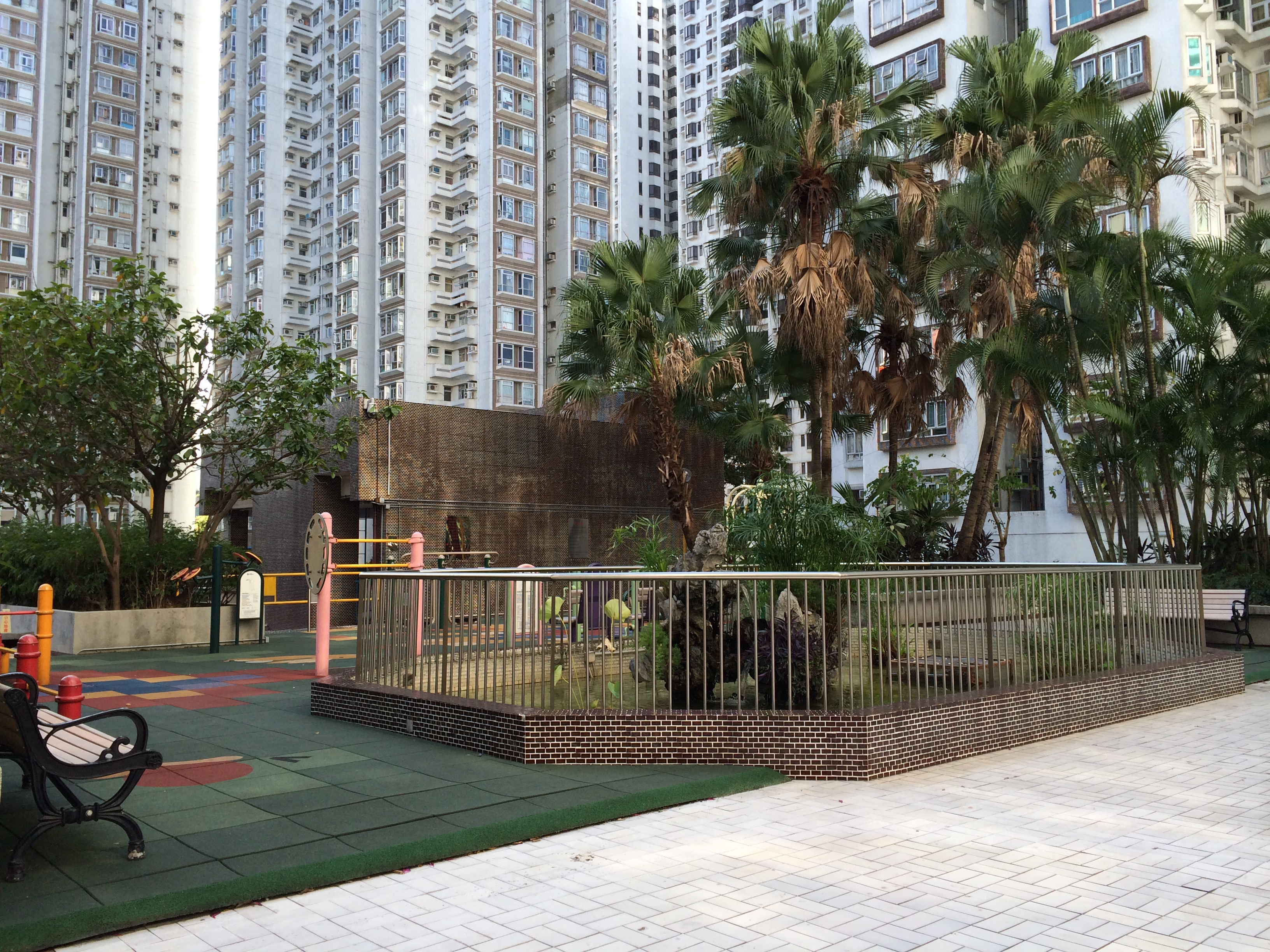 Lucky Plaza Level 4 Podium Garden